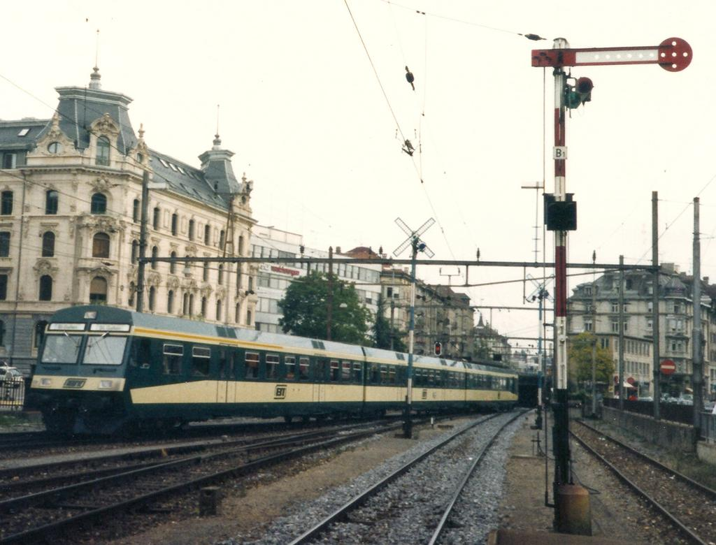 BT-Triebwagen RBDe 4/12 76 in St. Gallen